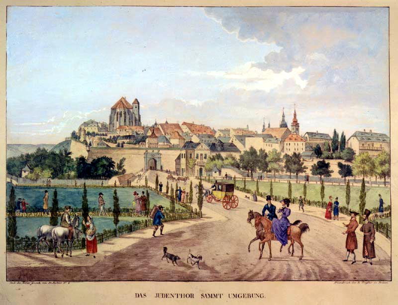 Veduta Brna z poloviny 19. století, kolorovaná litografie.